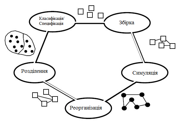 Проектна діяльність